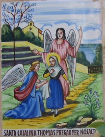 öffentlich zugängliche Schmuckkachel einer Außenwand eines Privathauses in Valldemosa